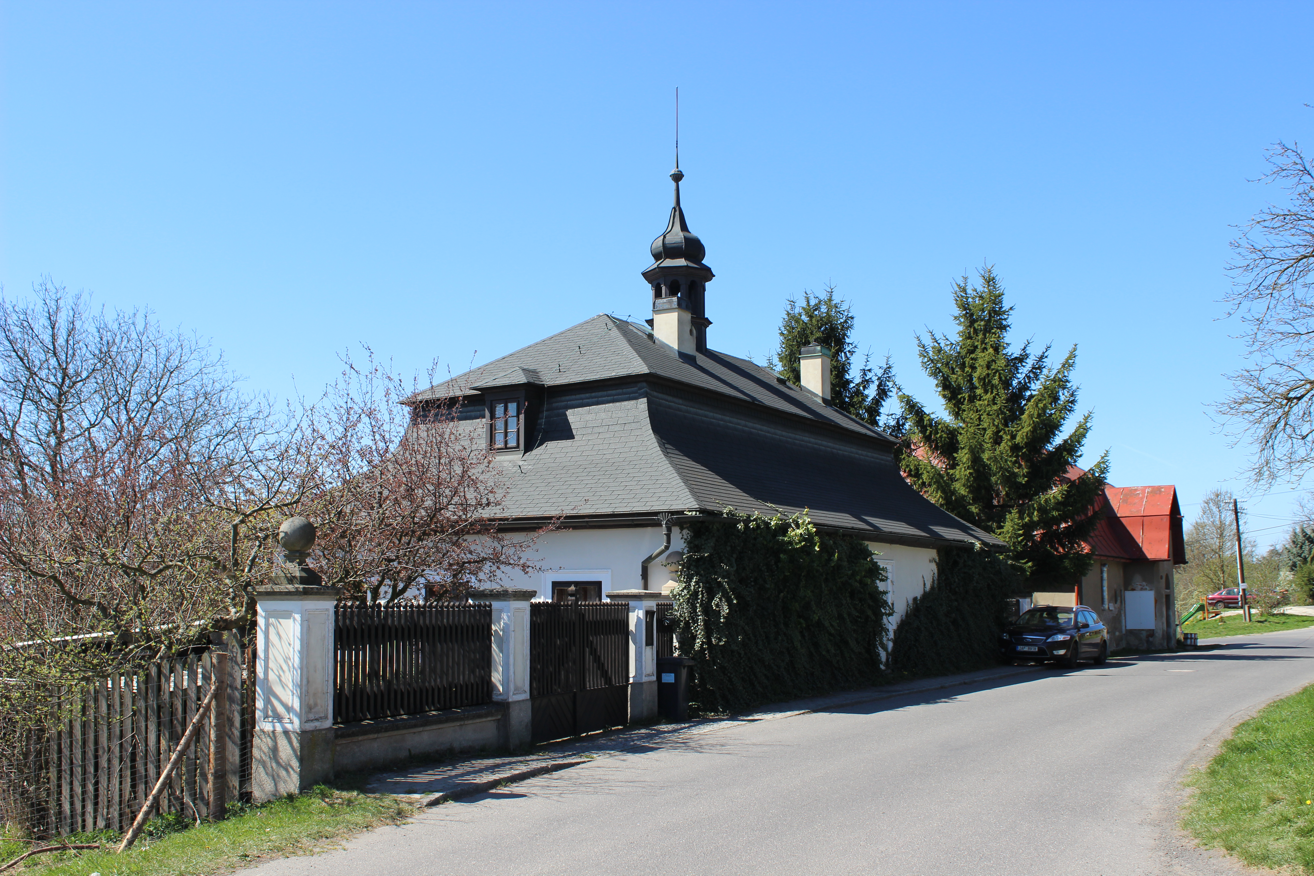 Dům s věžičkou číslo popisné 24 v Malém Rohozci, části Turnova.